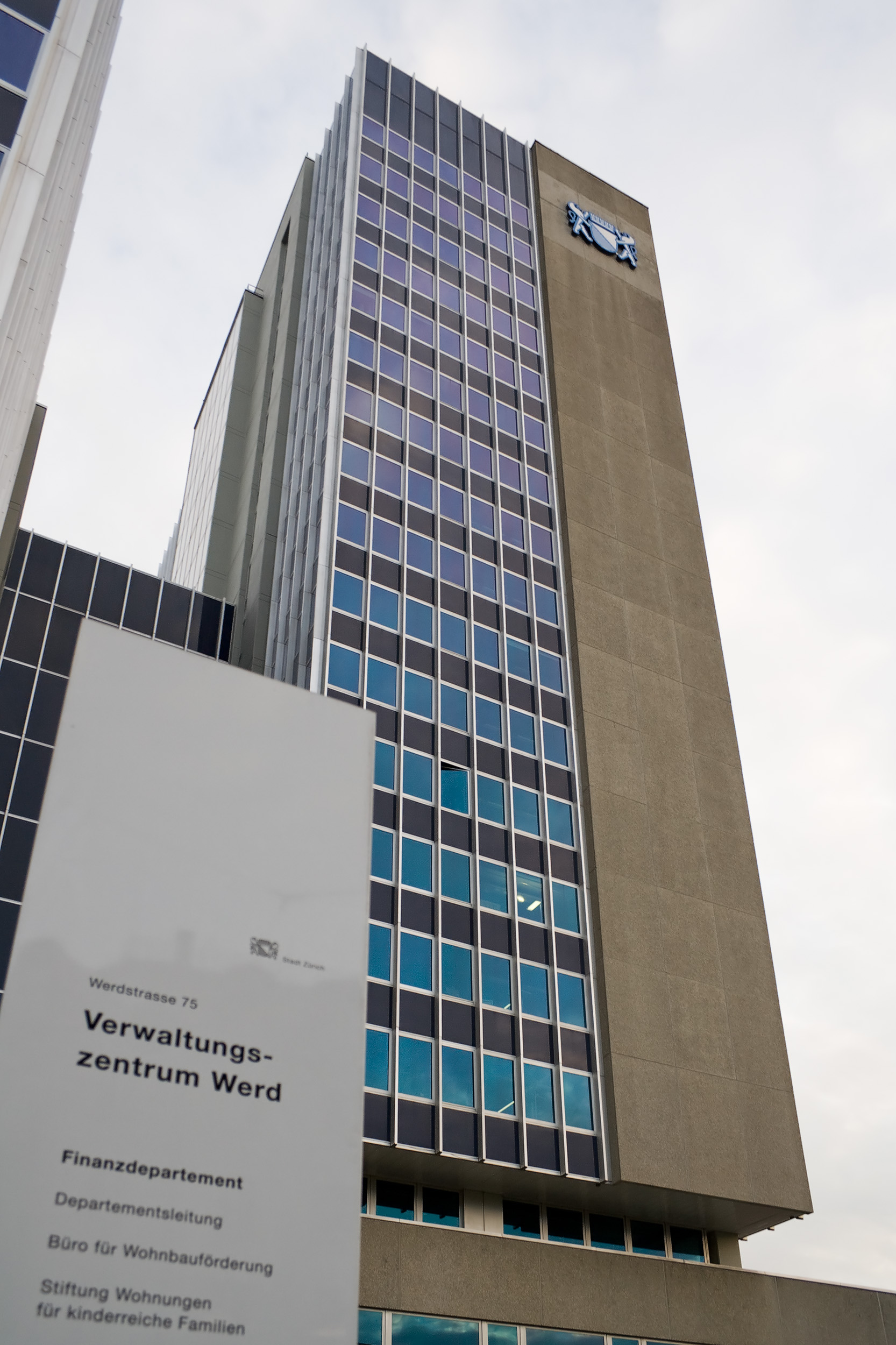 Verwaltungszentrum Werd, auch Werdhochhaus genannt, in Zürich